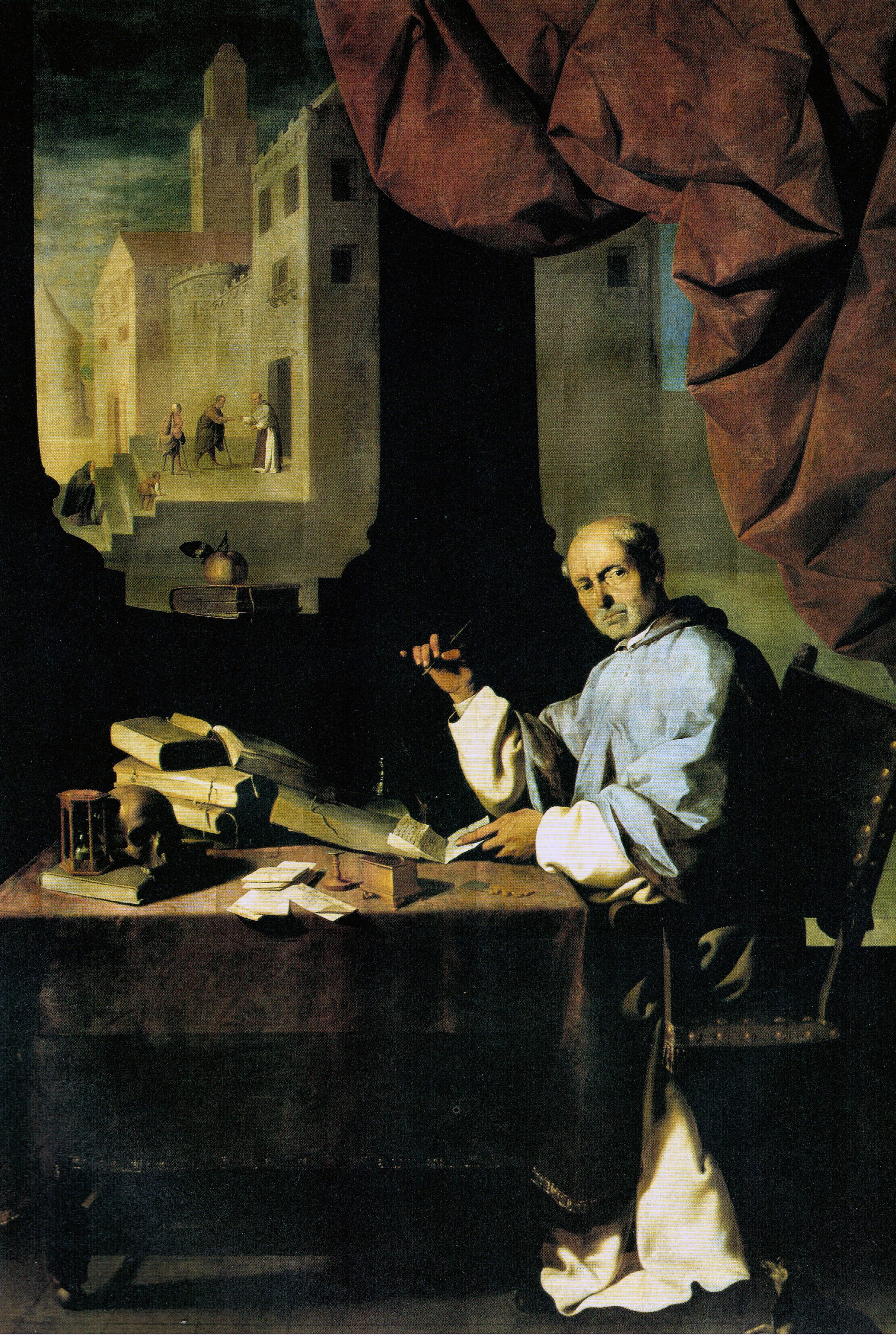 Retrato póstumo del prelado español Fray Gonzalo de Illescas († 1464), que llegó a ser obispo de Córdoba y prior del Real Monasterio de Santa María de Guadalupe.